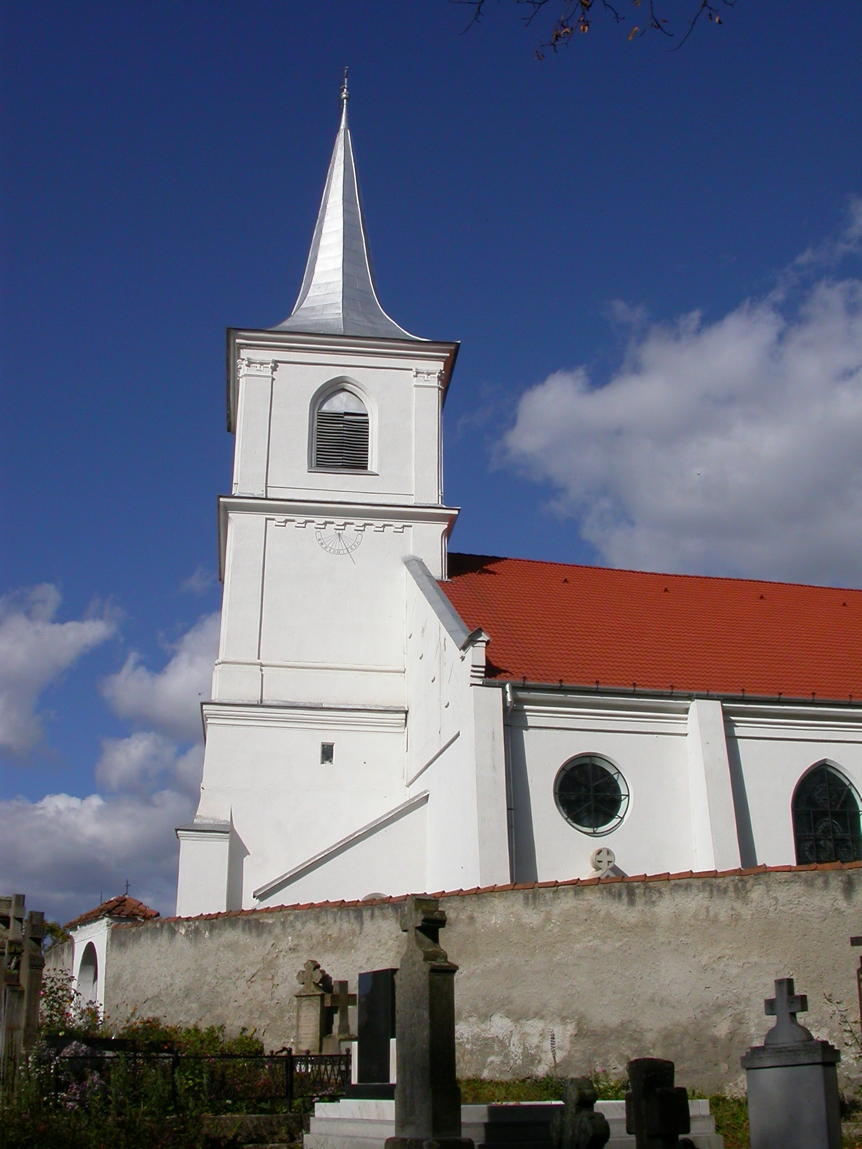 Ansamblul bisericii romano-catolice "Christos Rege" sec. XIV - XX